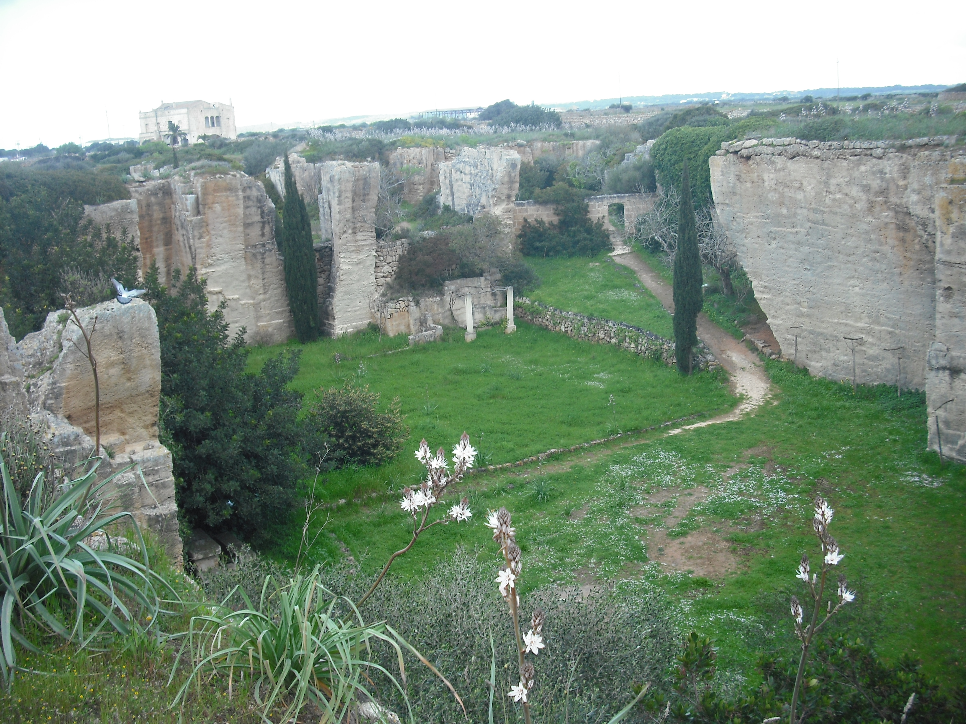 Pedrera Antigua